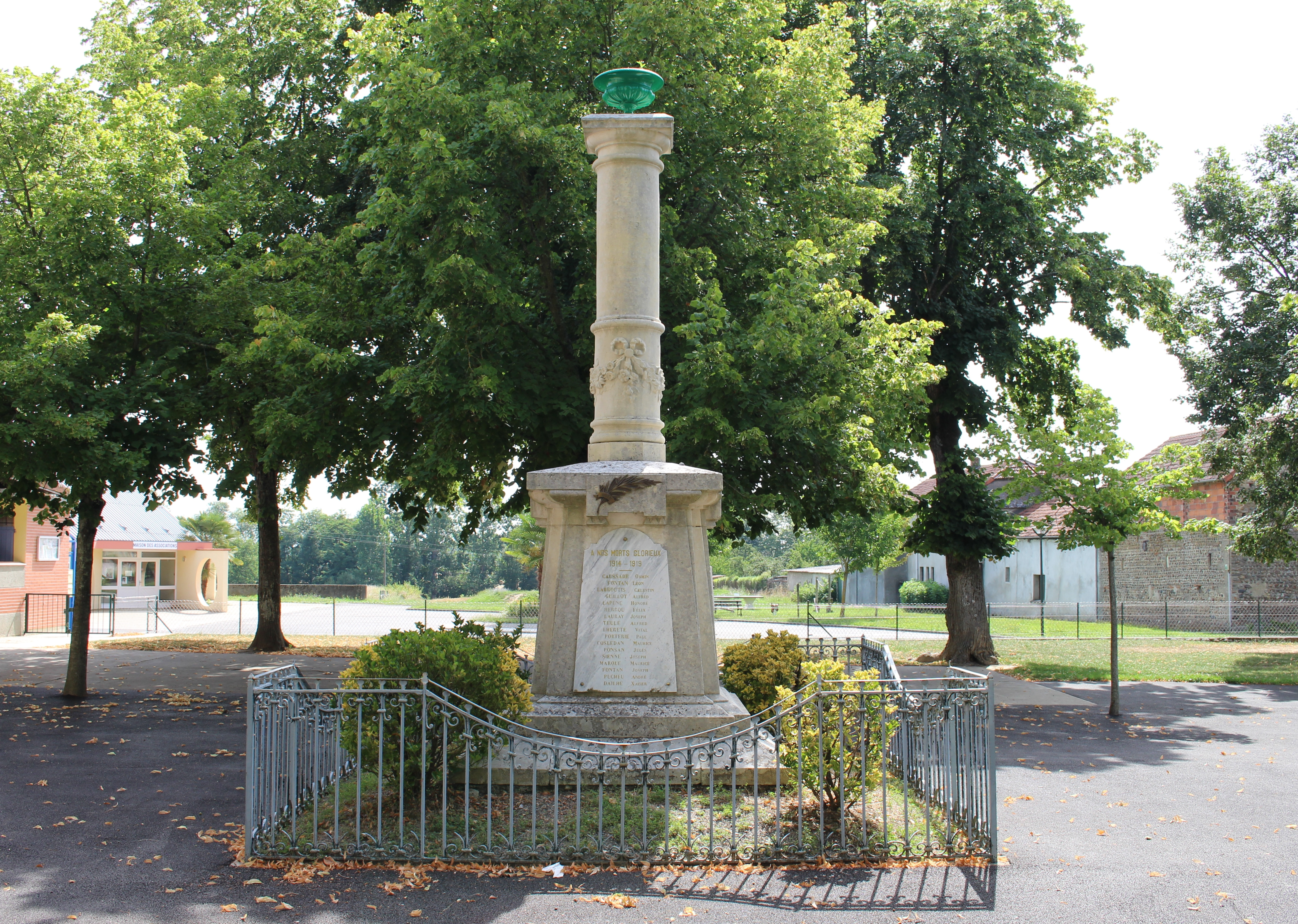 Monument aux morts de Saint-Lézer (Hautes-Pyrénées)